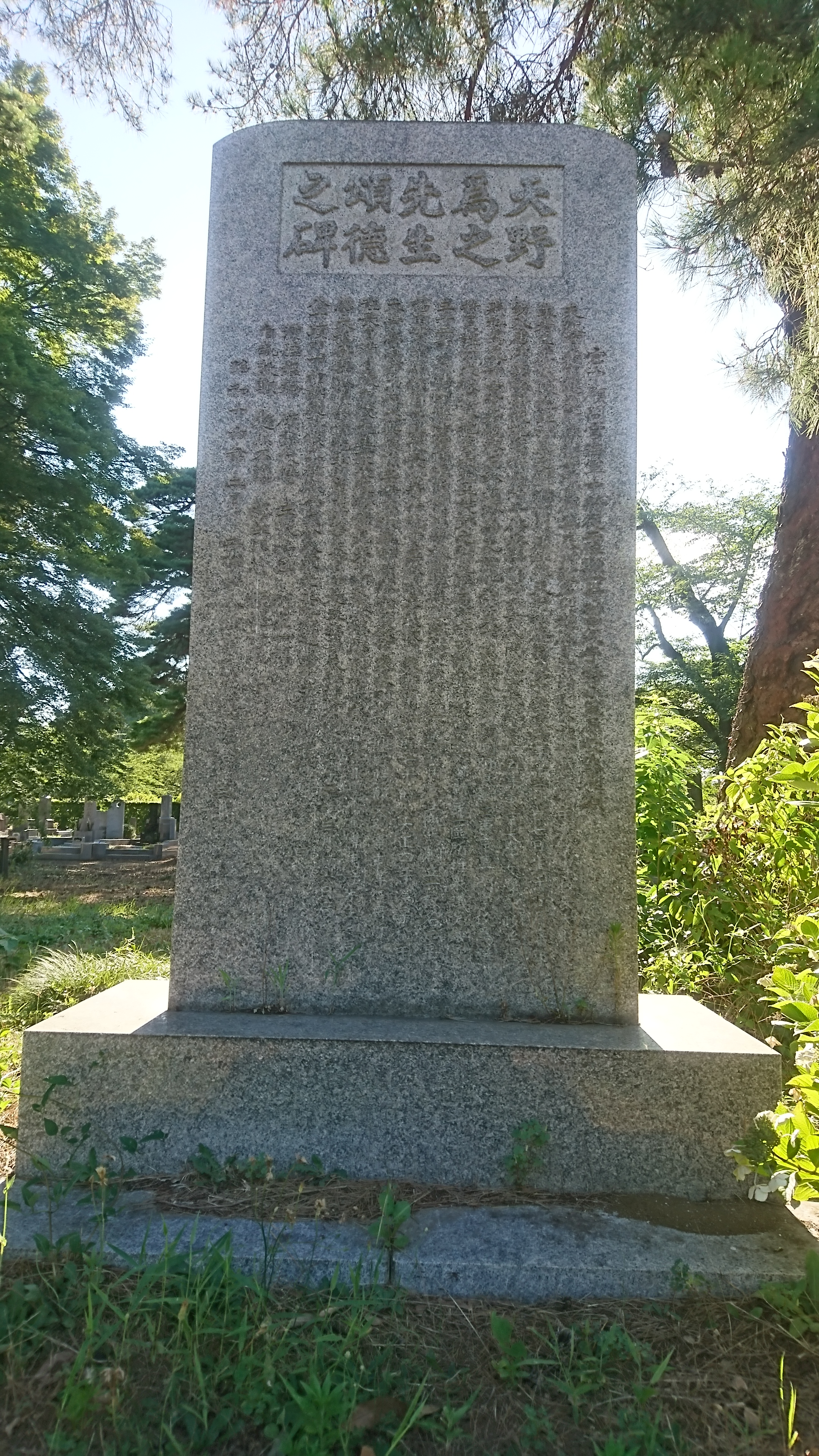 天野為之の頌徳碑